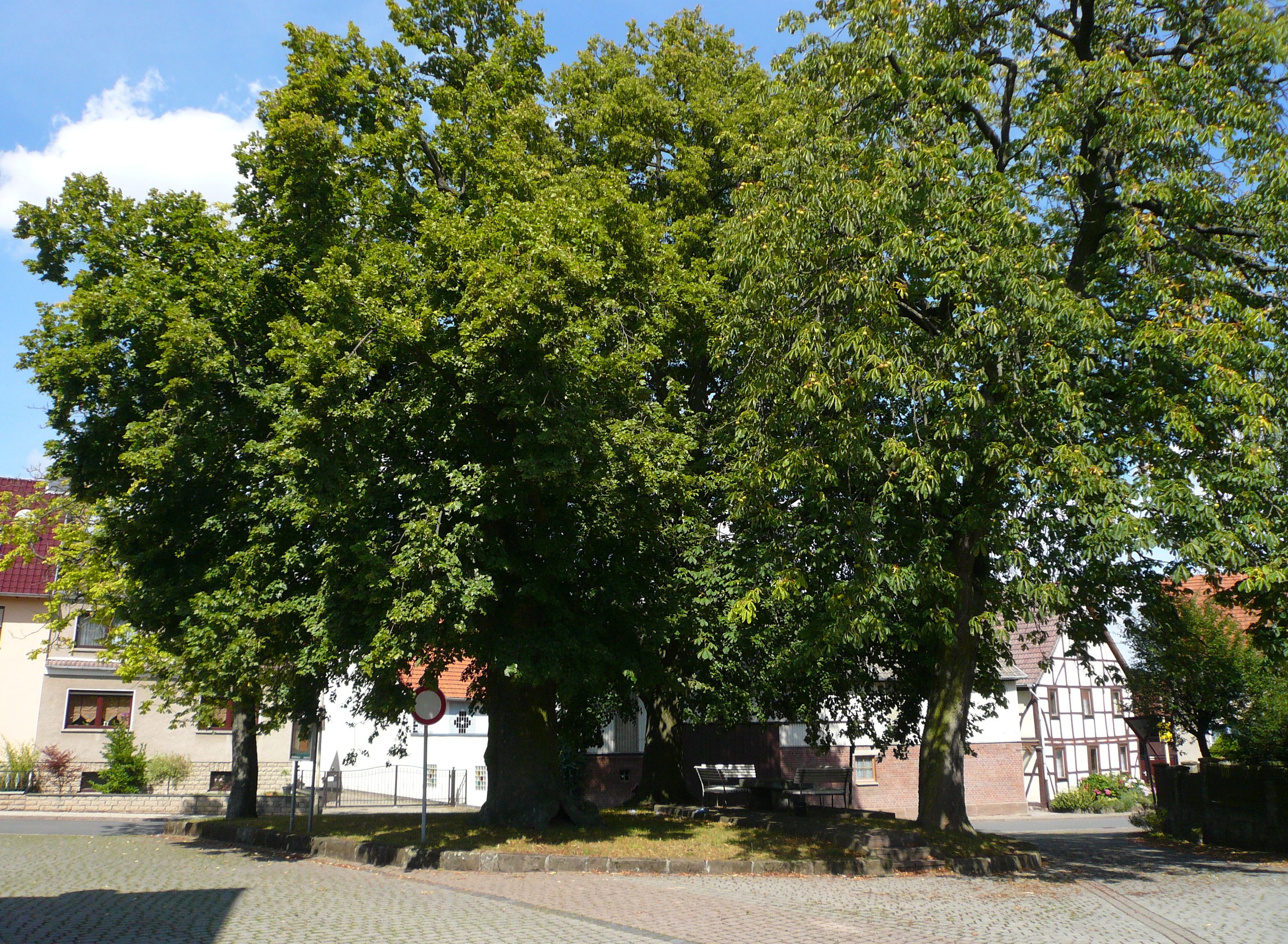 Anger in Freienhagen, Landkreis Eichsfeld